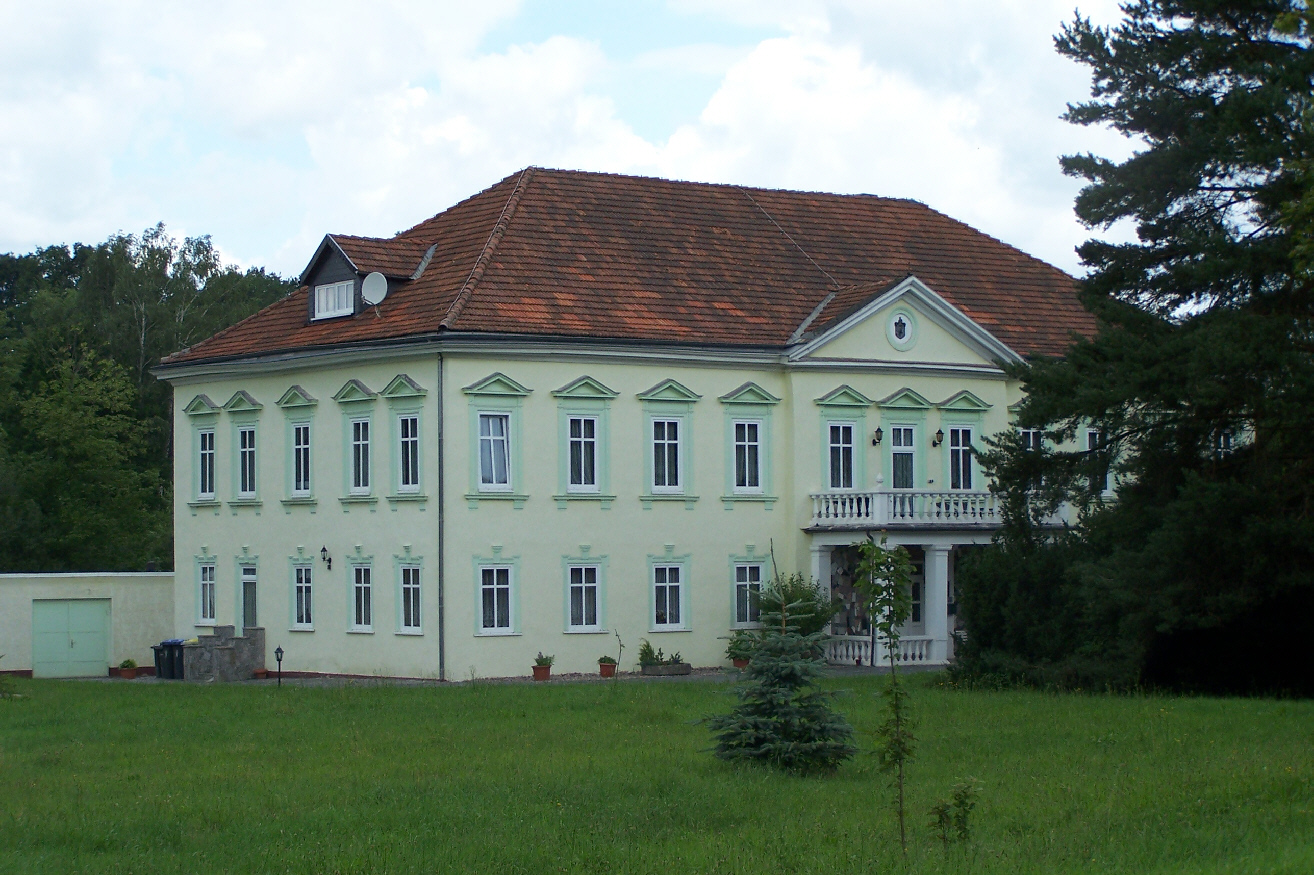 Das Marienthaler Schlösschen in Schweina. This is a photograph of an architectural monument. It is on the list of cultural monuments of Schweina